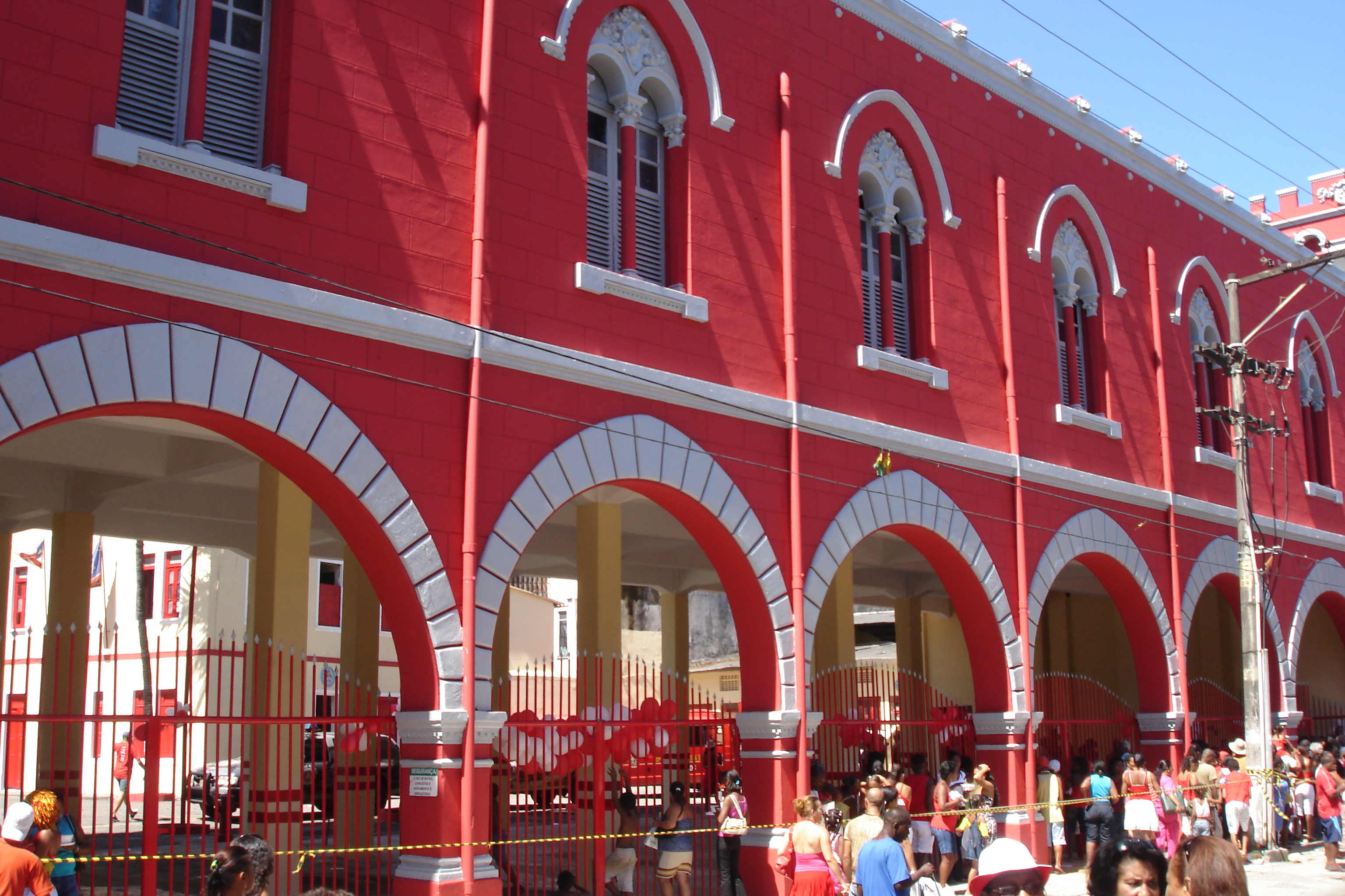 Quartel do corpo de Bombeiro, Salvador, Bahia